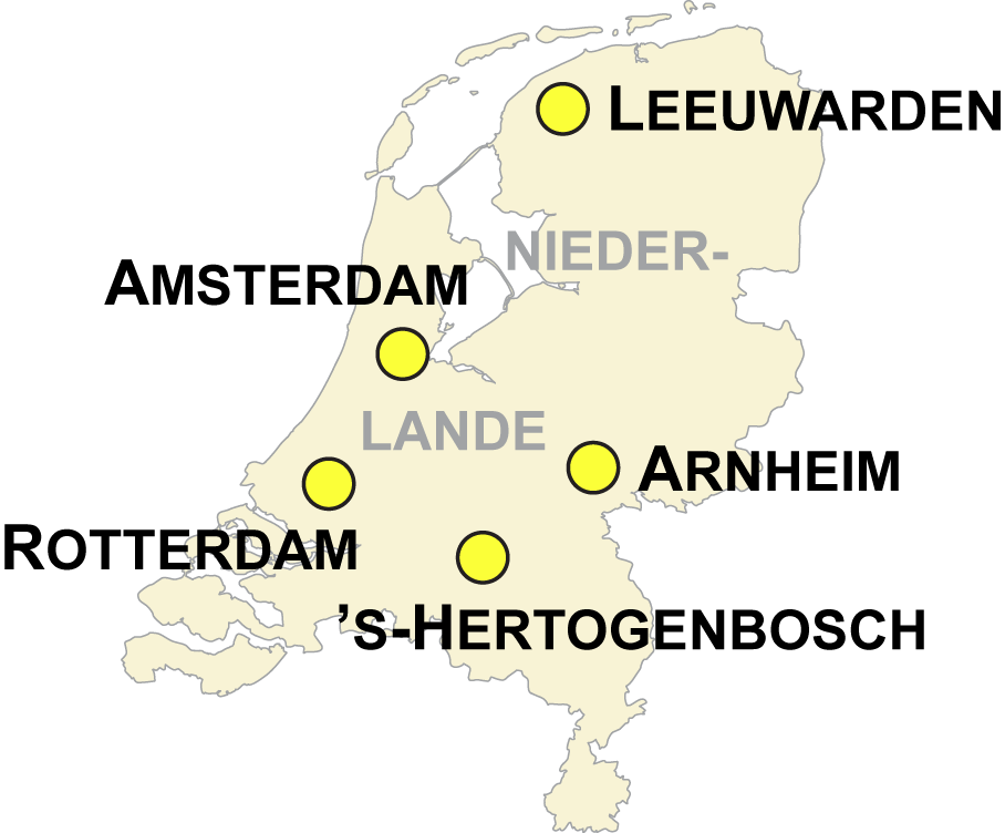 Austragungsorte der Futsal-WM 1989 in den Niederlanden This map is the result from a map request to the Kartenwünsche in the Kartenwerkstatt. You can make a request for a new map to us as well.